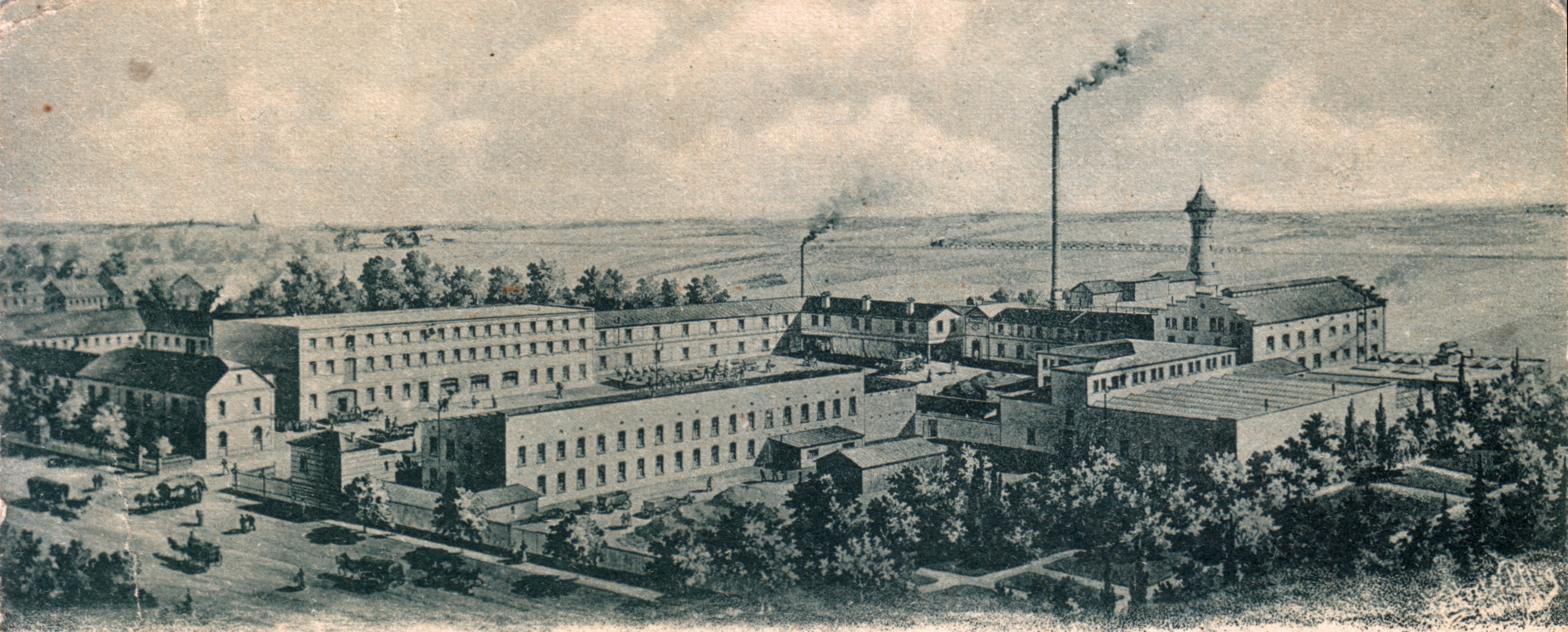 „Gruß aus Markranstädt“. Rauchwaren-Zurichterei & Färberei Actien-Gesellschaft, vorm. Louis Walter's Nachfolger, Markranstädt (bei Leipzig, undatiert). Postkarte. Verlag von Hugo Hörold, Markanstädt. Ca. 14 x 9 cm